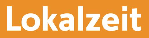 Lokalzeit